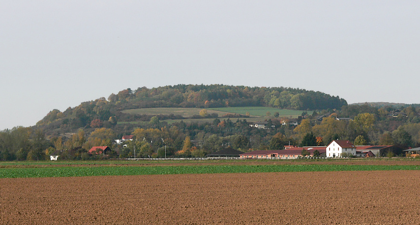 Eckerich bei Fritzlar